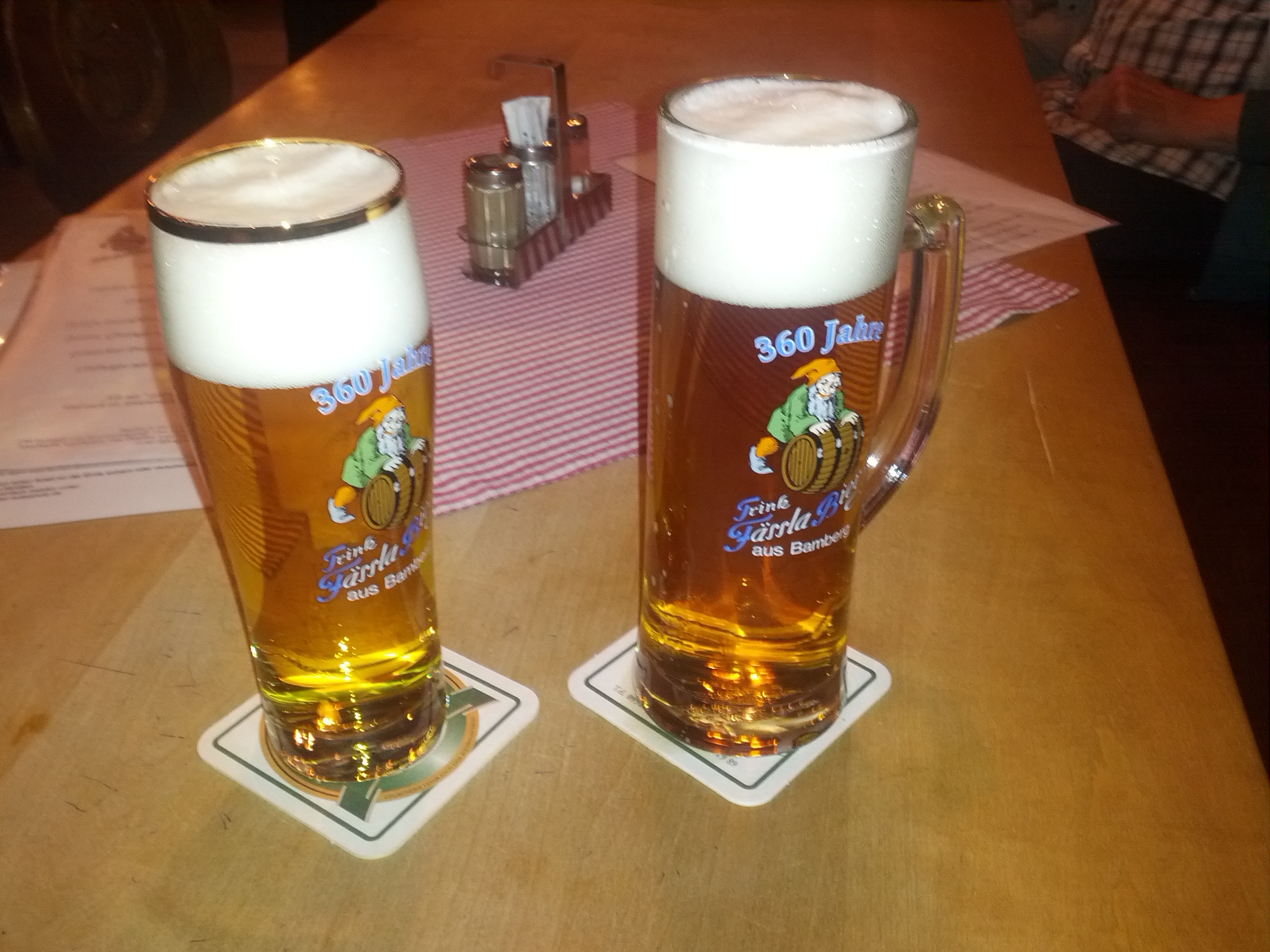 Bier der Bamberger Brauerei Zum F�ssla